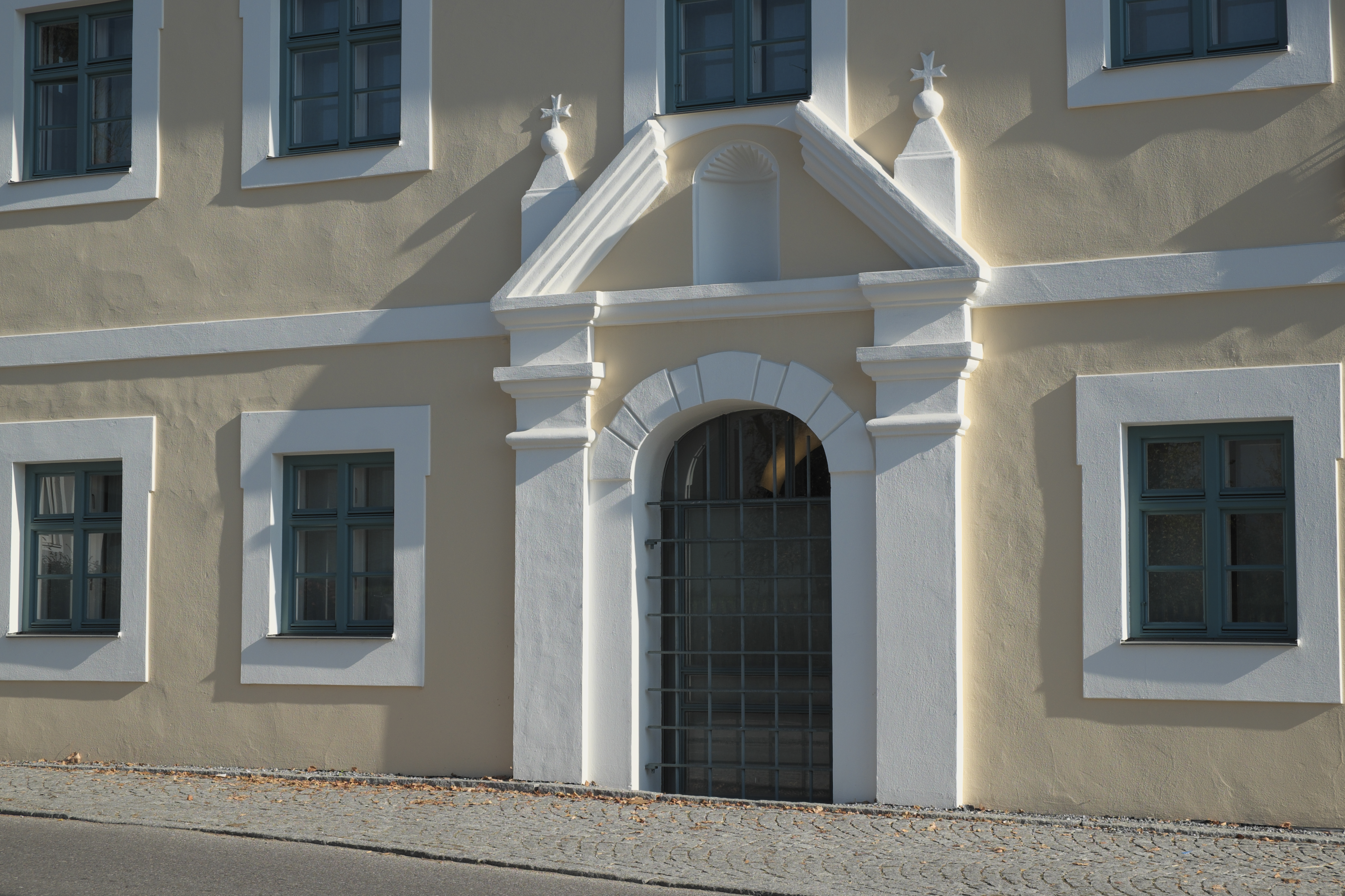 Ehemaliges Gasthaus am Marktplatz 1 in Petershausen im Landkreis Dachau (Bayern/Deutschland), Eingang